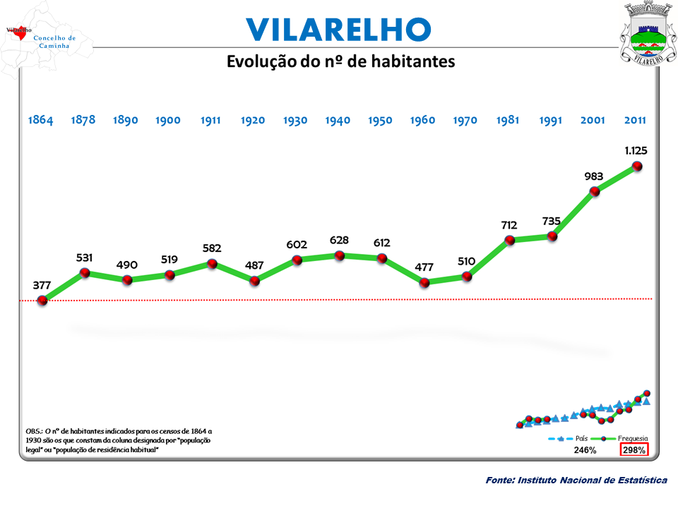 Censos 1864/2011